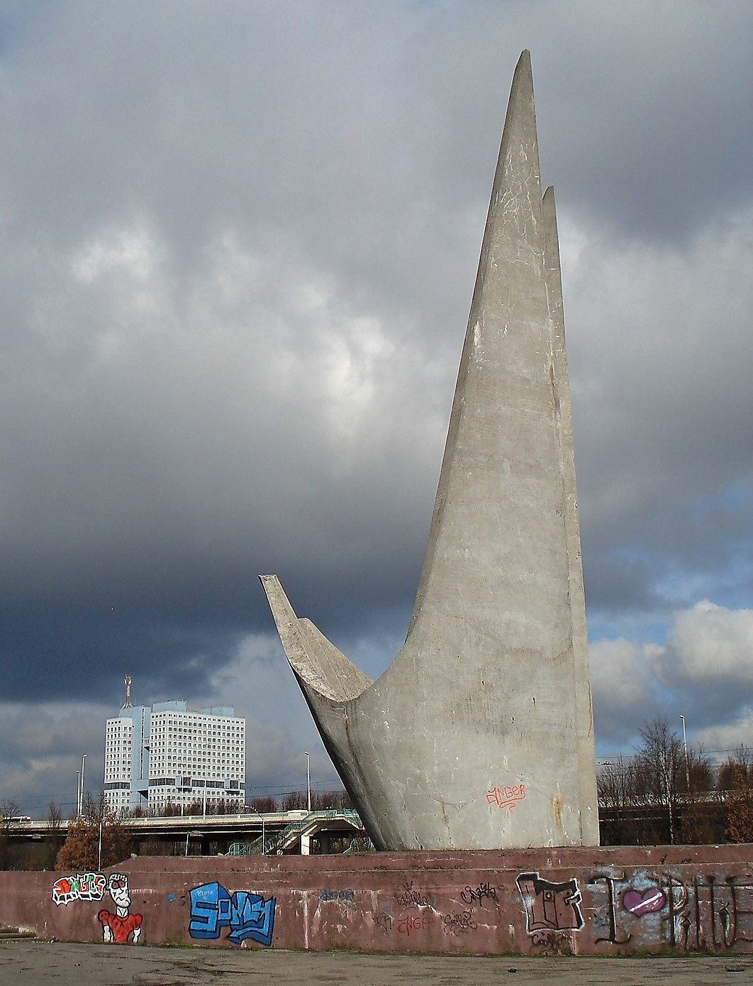 Памятный знак рыбакам океанического лова: улица Прав.набережная, у здания спорт.комплекса "Юность", Калининград, Калининградская область